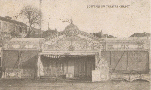 Carte postale représentant le Théâtre Chabot (carte postale de la collection Créteur)